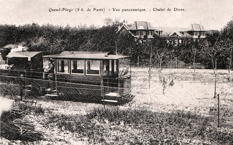 Le tramway de Quend près de son terminus littoral